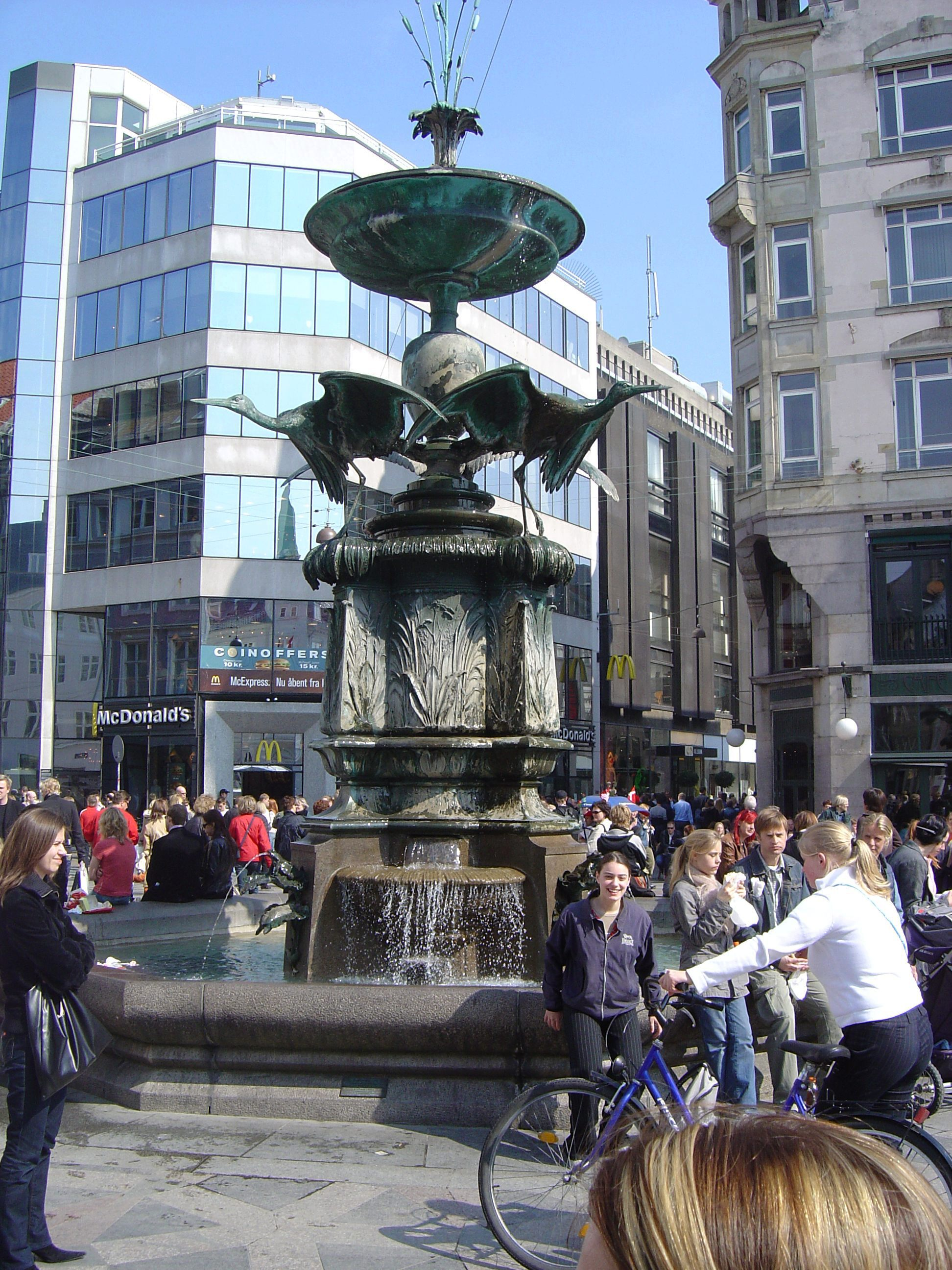 Storkespringvandet på Strøget